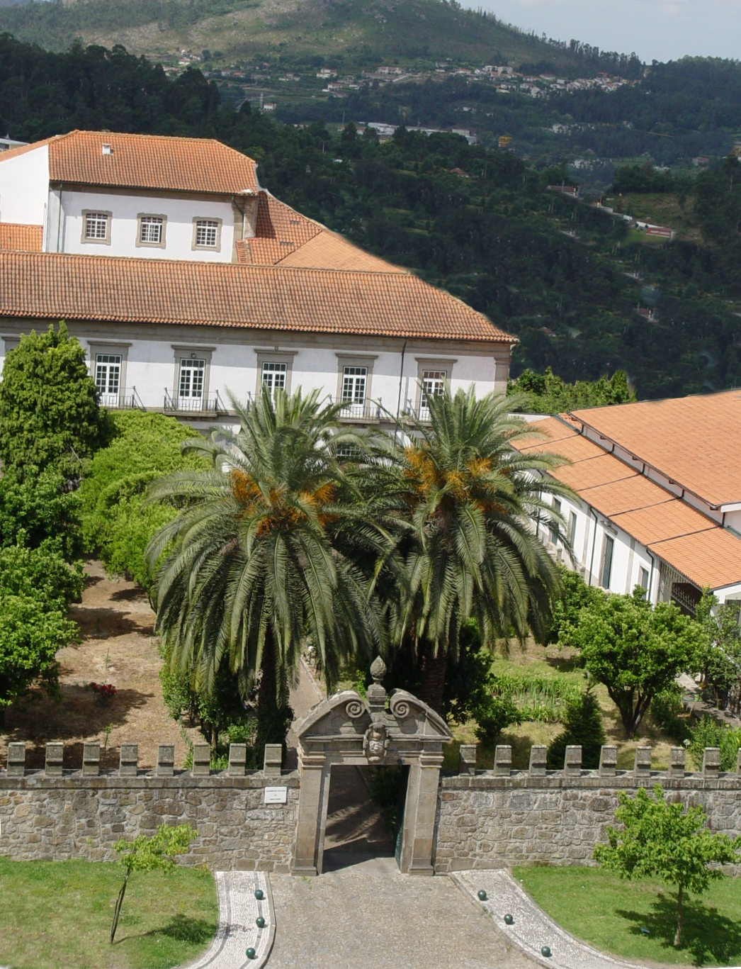 Visitação Monastery in Braga Portugal